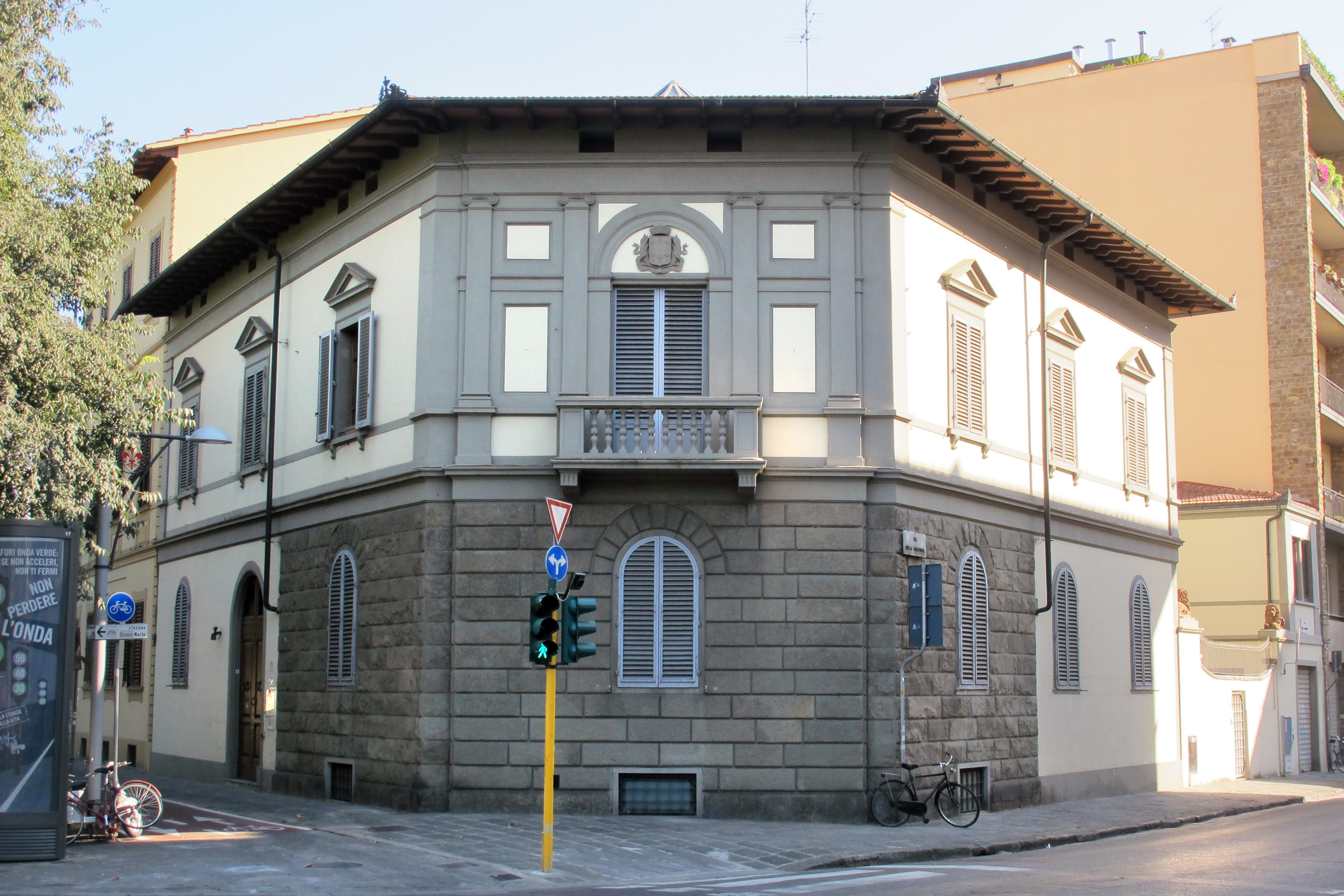 Viale Antonio Gramsci, Firenze